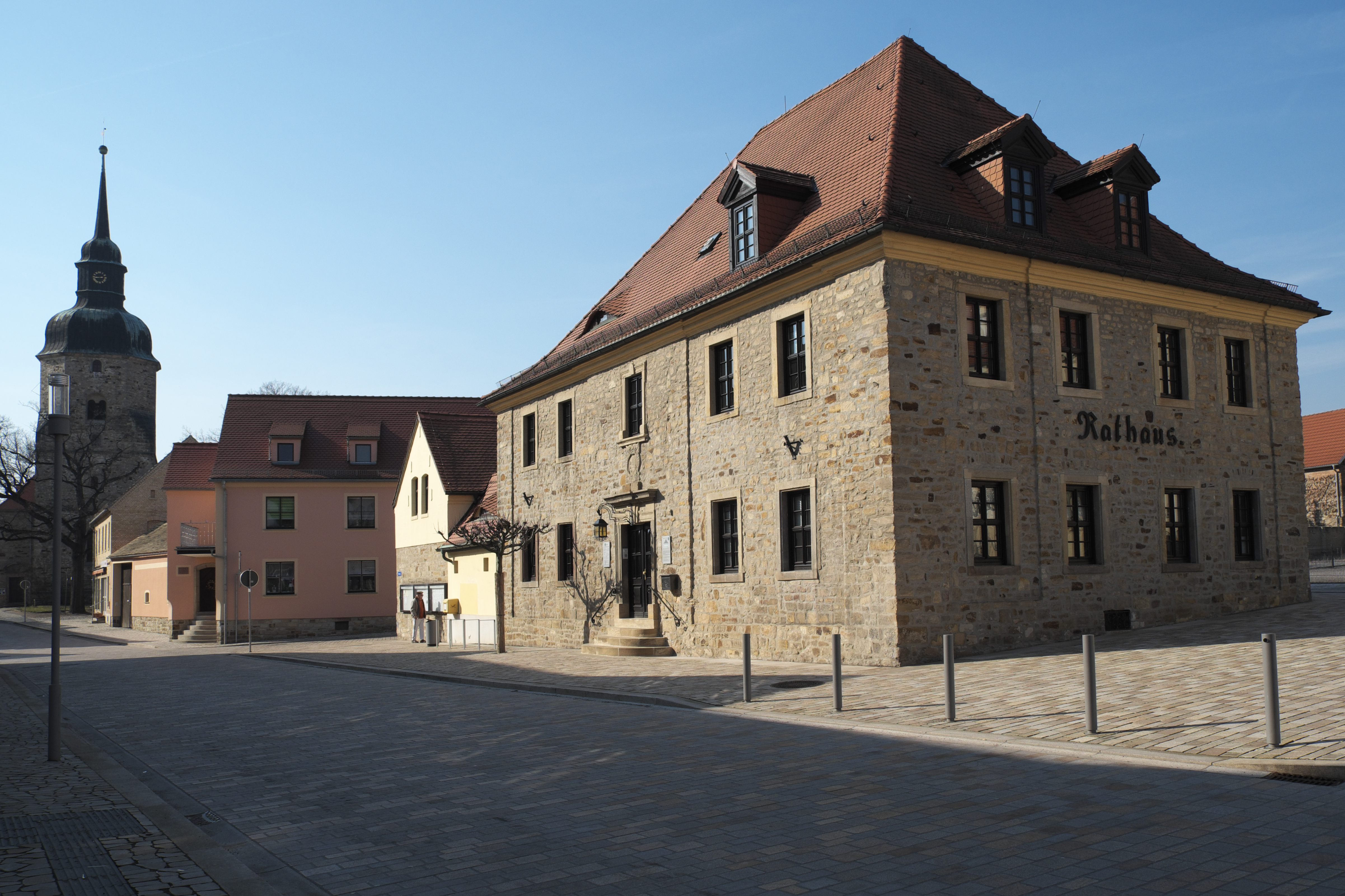 Rathaus in Bad Lauchstädt im Saalekreis in Sachsen-Anhalt/Deutschland